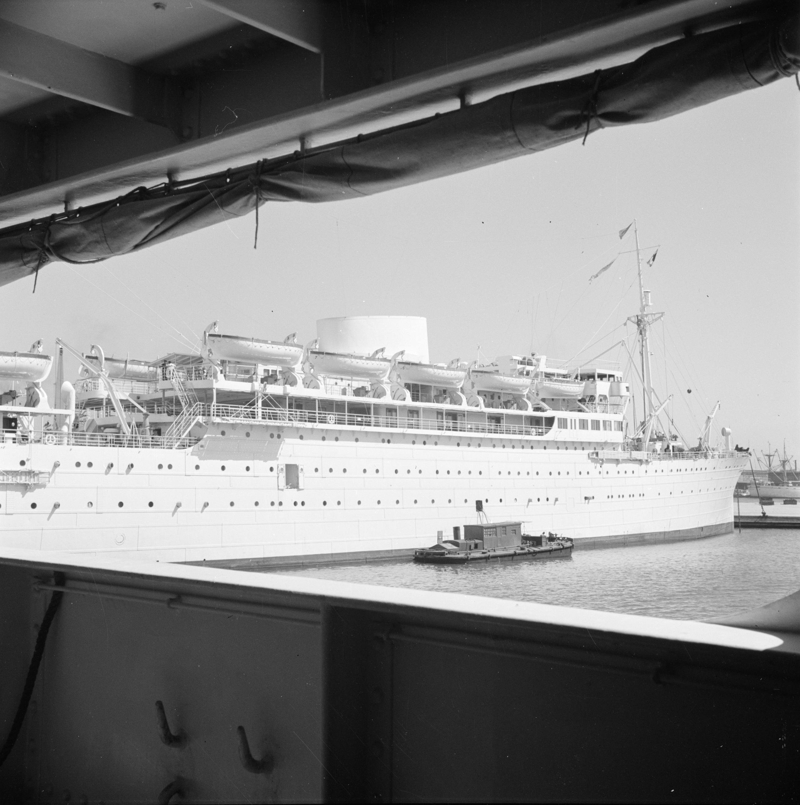 Collectie / Archief : Fotocollectie Van de Poll Reportage / Serie : Midden-Oosten 1950-1955: Egypte Beschrijving : Schip 'Marechal Joffre' in de haven van Alexandrië Datum : 1950 Locatie : Alexandrië, Egypte Trefwoorden : havens, passagiersschepen Fotograaf : Poll, Willem van de Auteursrechthebbende : Nationaal Archief Materiaalsoort : Negatief (zwart/wit) Nummer archiefinventaris : bekijk toegang 2.24.14.02 Bestanddeelnummer : 255-6593